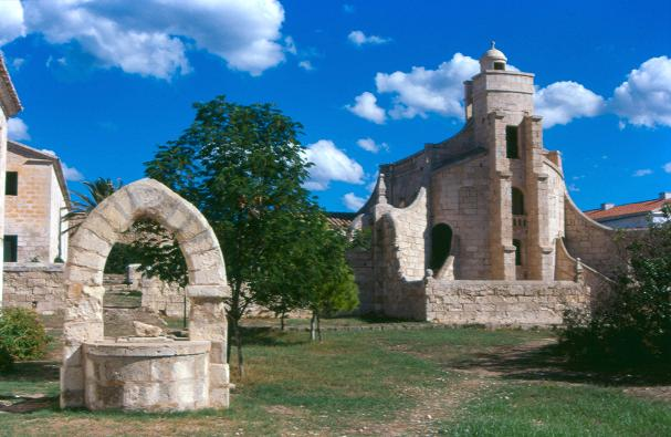 Interior Lazareto